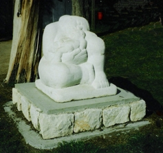 פסל אמא אדמה, אבן, קיבוץ כפר מסריק.